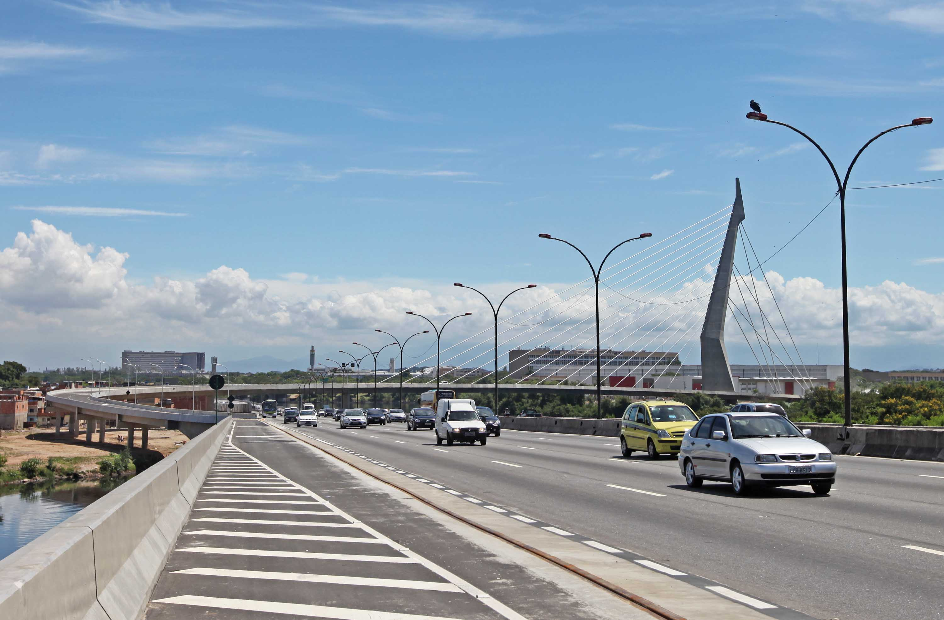 Foto na inauguração da Ponte do Saber, primeira ponte estaiada do Rio de Janeiro.